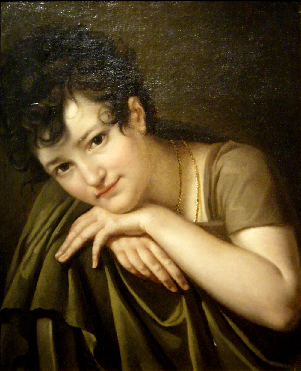 Musée Thomas-Henry, Cherbourg-Octeville - Portrait de jeune femme, Bon Thomas Henry Huile sur toile, acquisition 1978